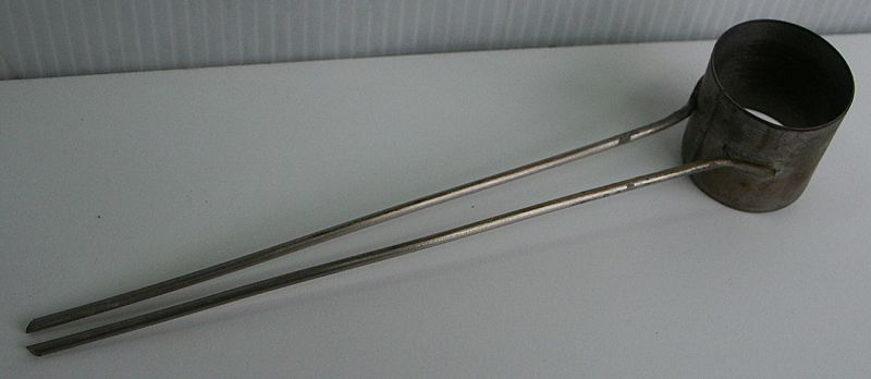 lechatalier nidel